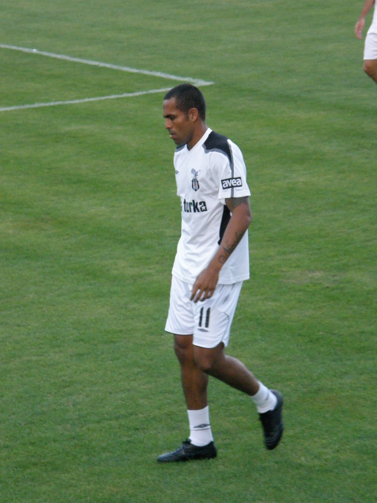 Ağustos 2008 Beşiktaş - Hazar Lankaran maçında çekilmiştir